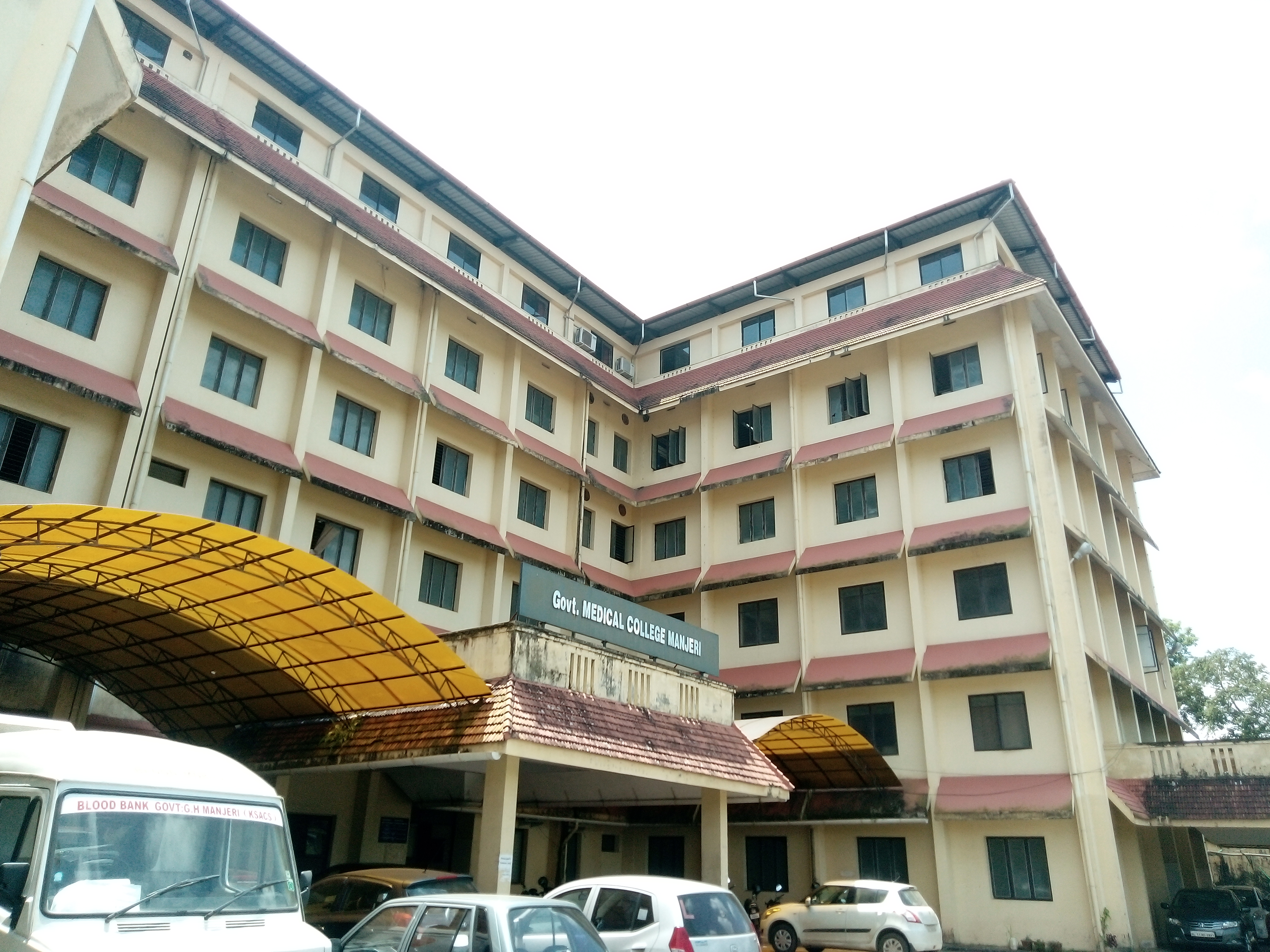 malappuram manjeri medical college sep 5 - 2018